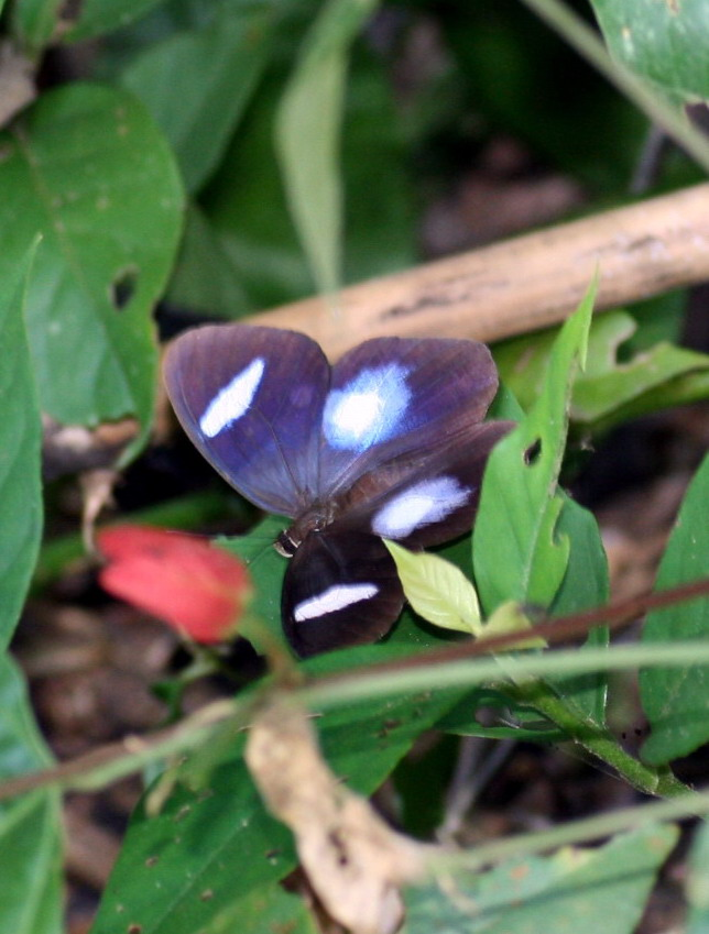 Peru, Tambopata reserve. Aug. 2008